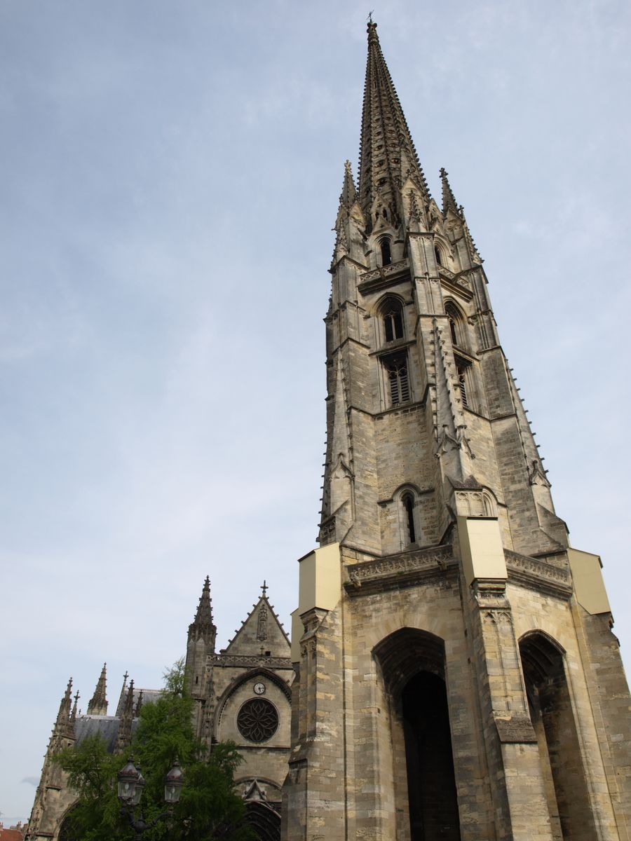 Bordeaux - Basilique et Flèche Saint-Michel